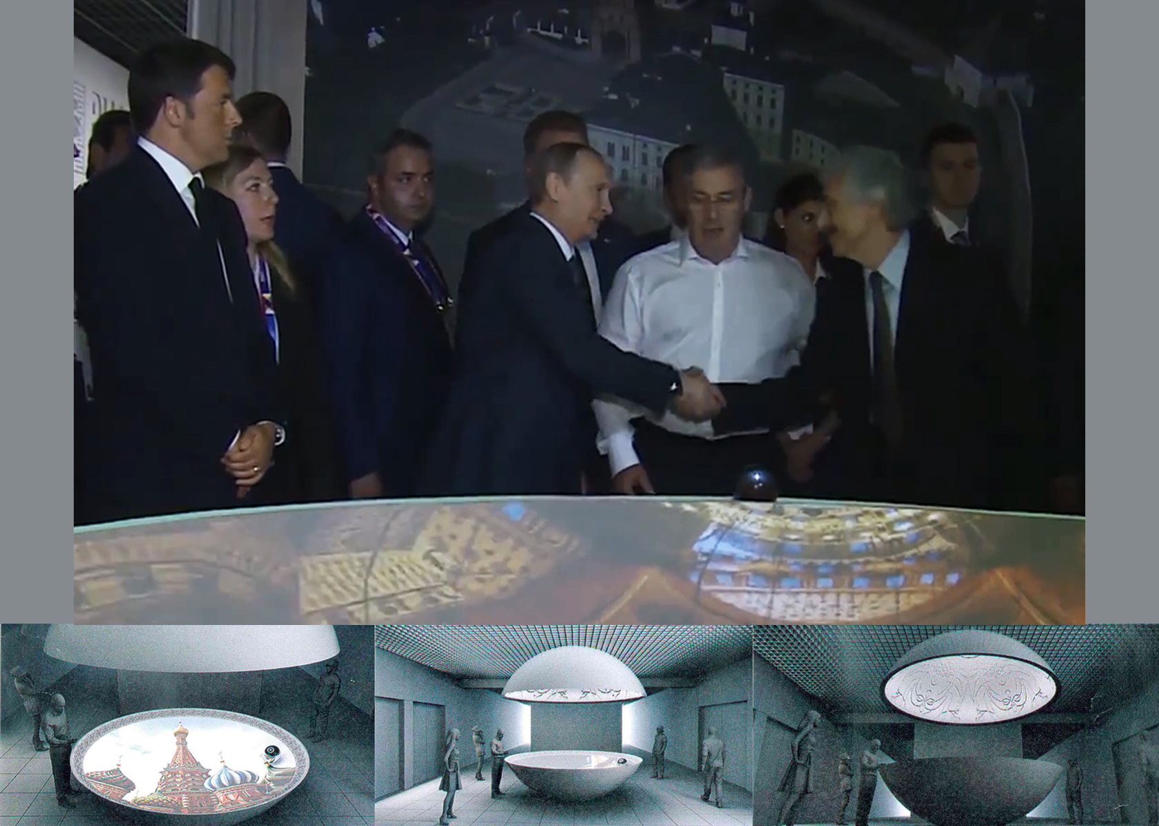 Expo padiglione della Federazione russa